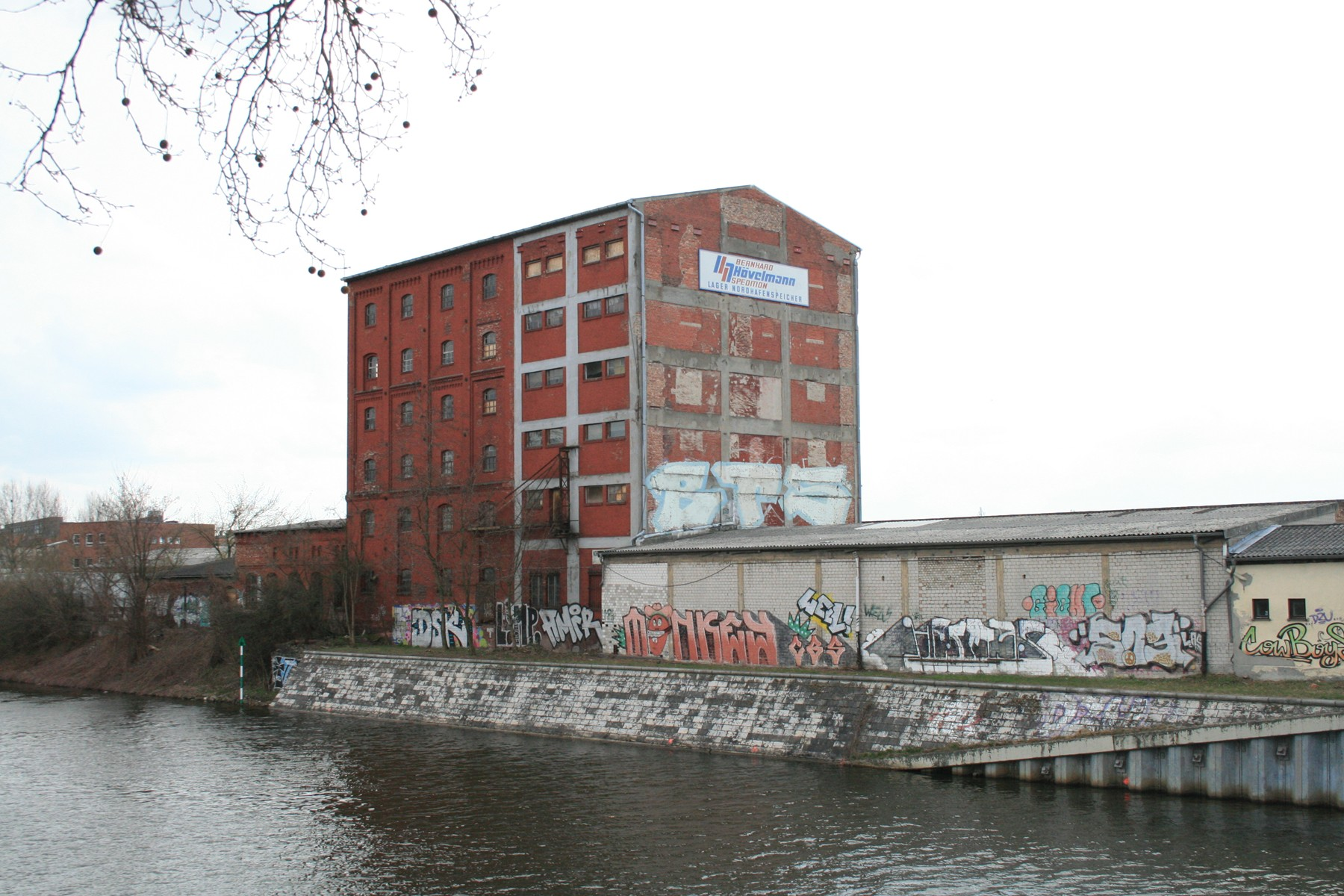 Berlin-Moabit, Heidestraße 20C. Kornversuchsspeicher.